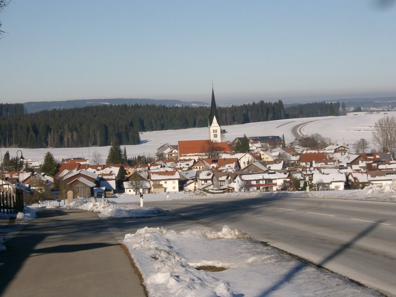 Gemeinde Wald, Winterbild